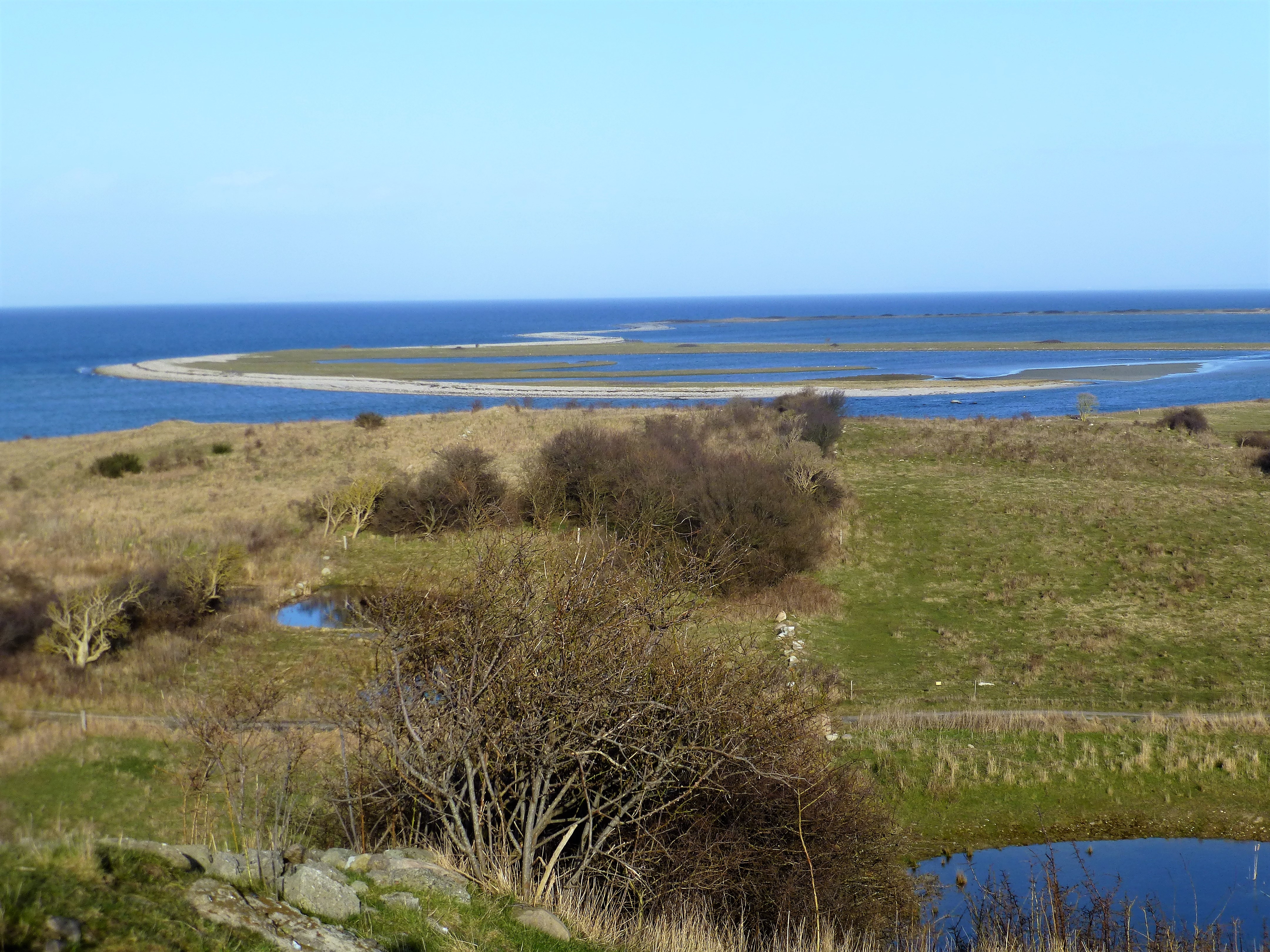 Tornen og Fællesstrand set mod øst fra Fyns Hoved